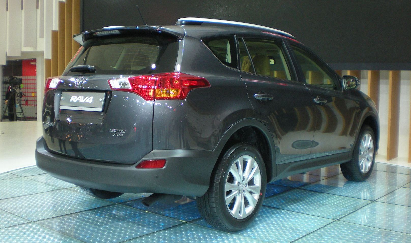 トヨタ・RAV4